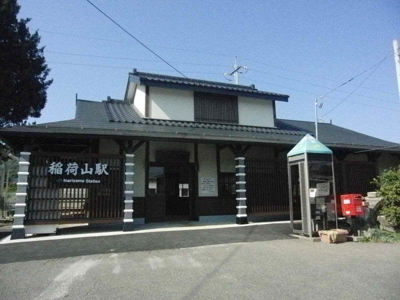 JR東日本篠ノ井線の稲荷山駅の駅舎の写真です。